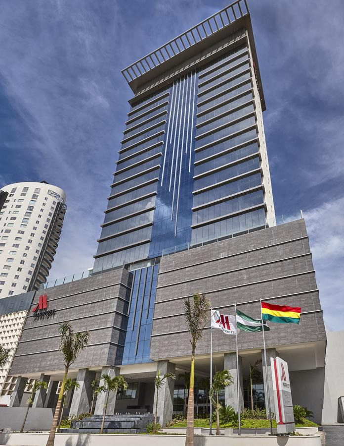 Hotel Marriott